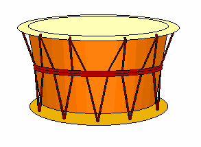 שימה דאיקו - תוף יפני ציור שאני יצרתי והעלתי אסף.צ 18:16, 9 מאי 2005 (UTC)